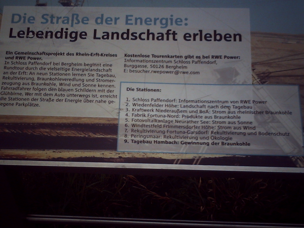 Schautafel "Straße der Energie" am Aussichtspunkt Elsdorf